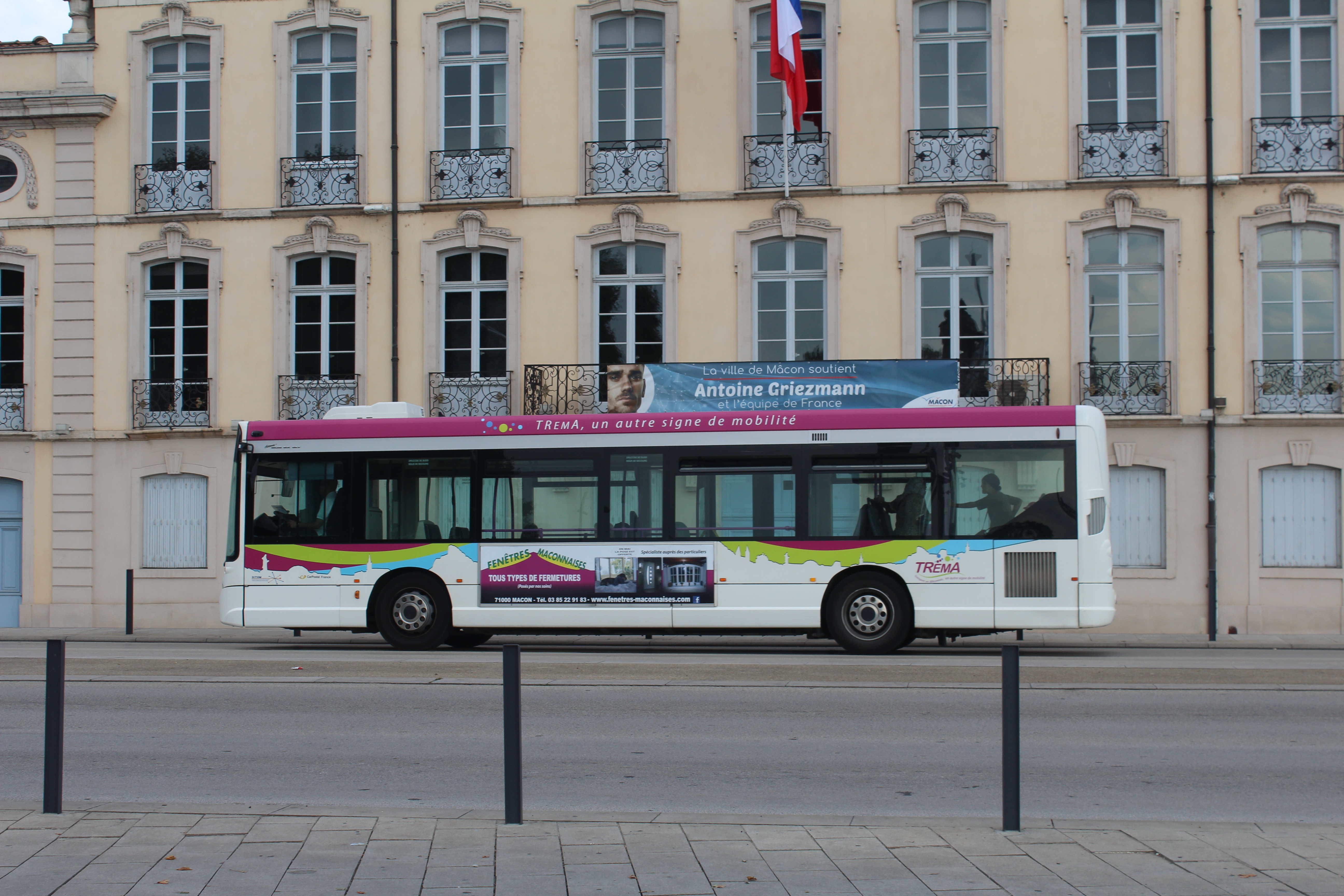 Bus Trema devant l'hôtel de ville de Mâcon.